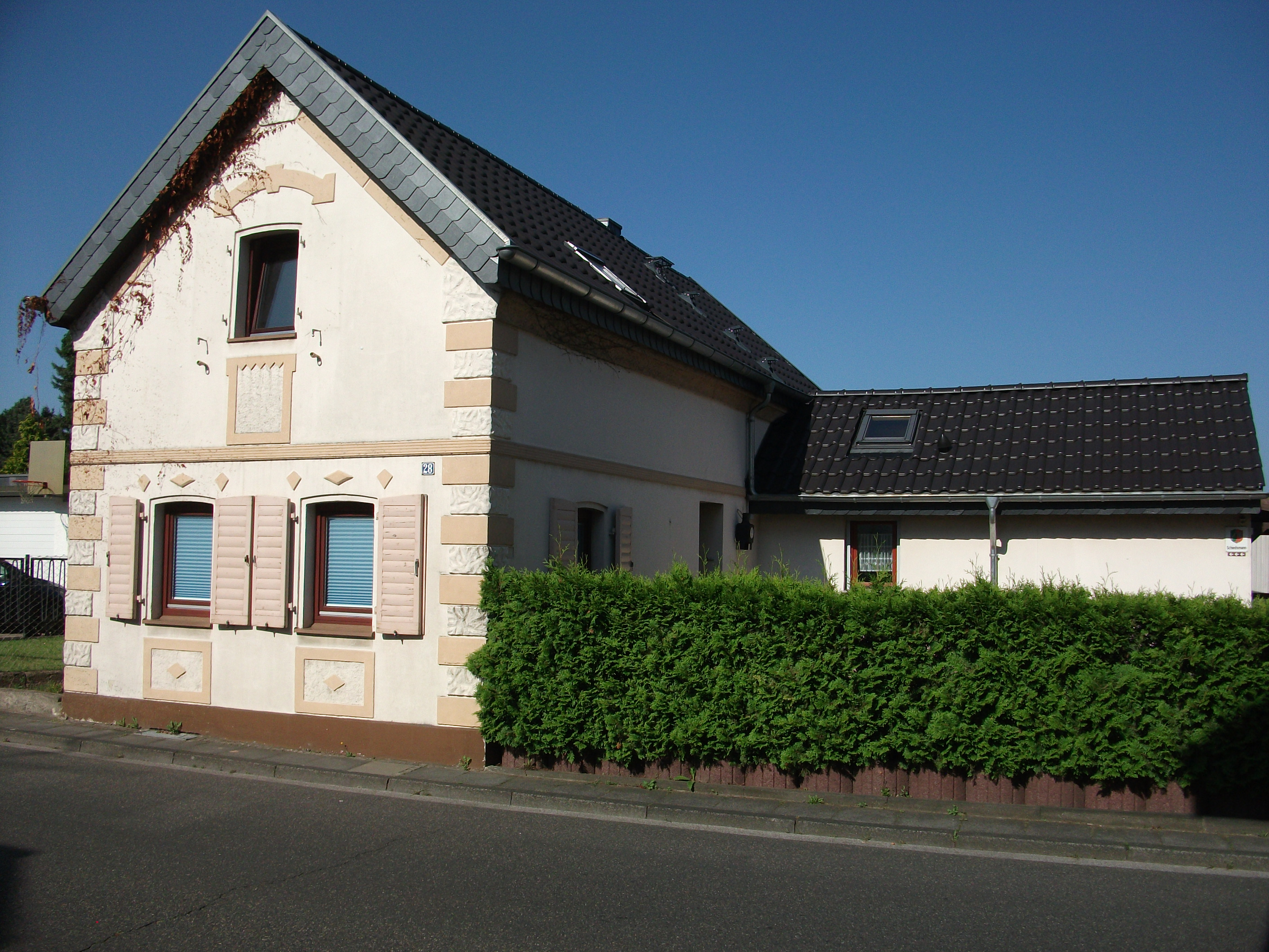 Haus in Porz-Elsdorf